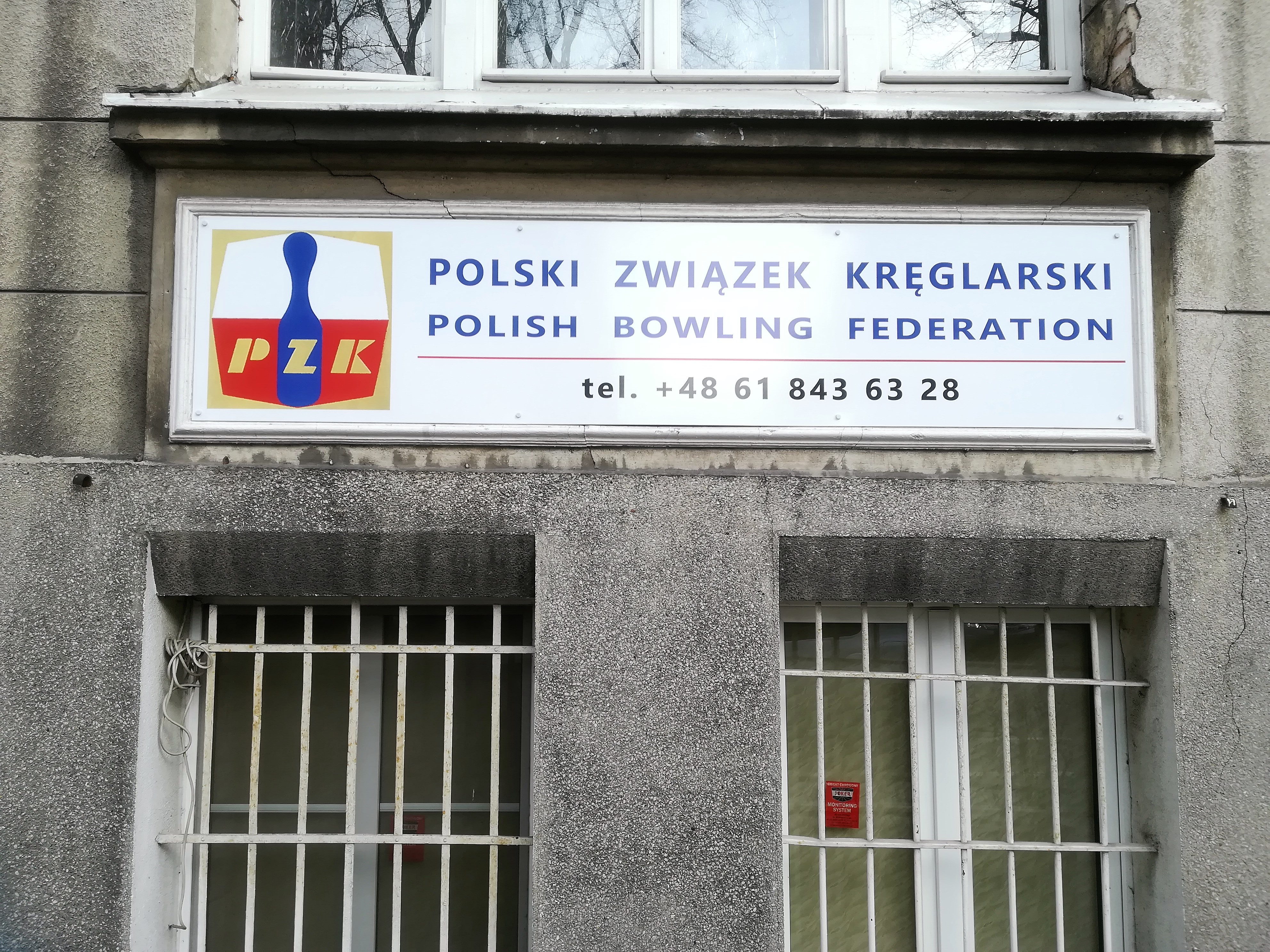 Siedziba Polskiego Zw. Kręglarskiego w Poznaniu.